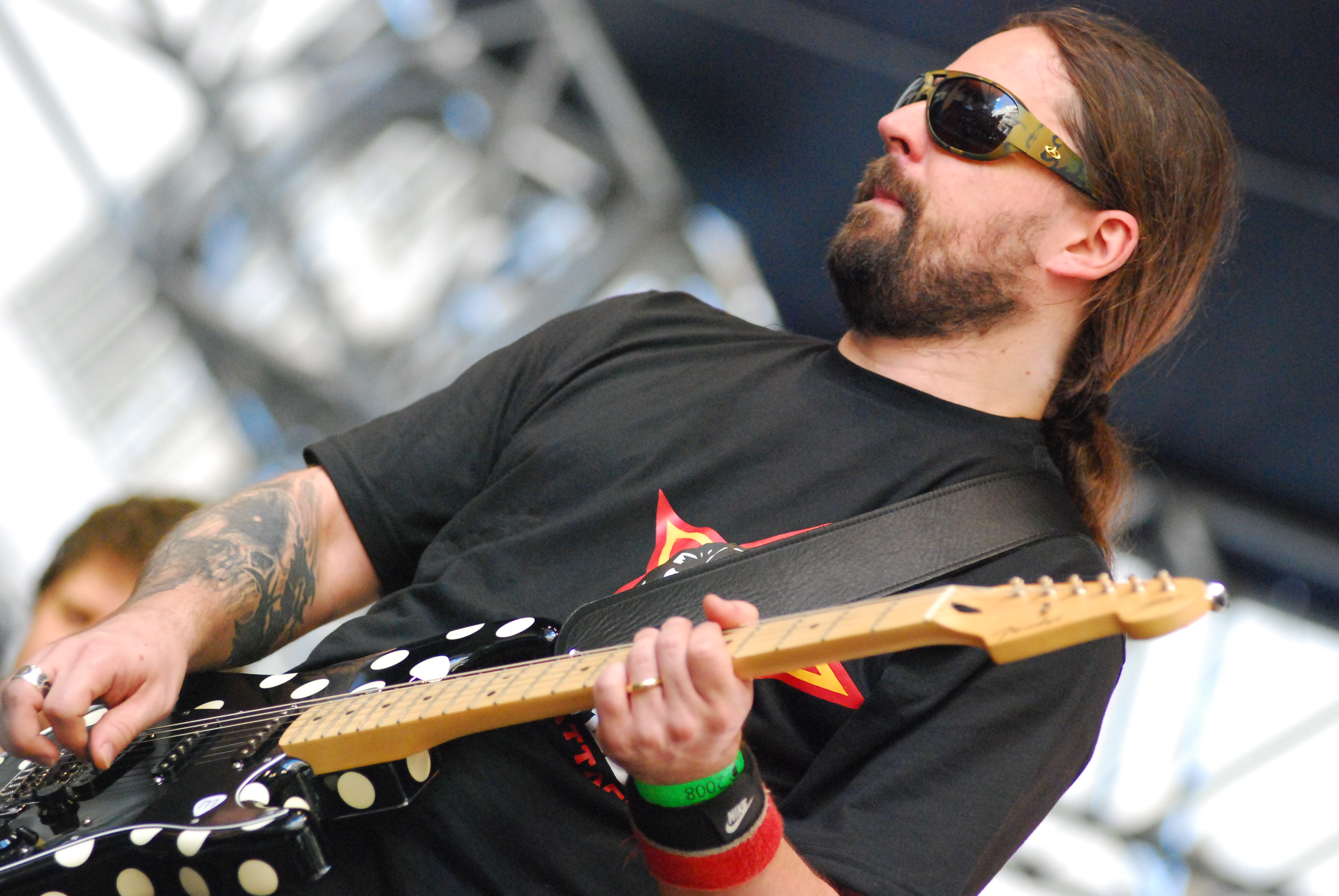 Foto: Silvio Tanaka.